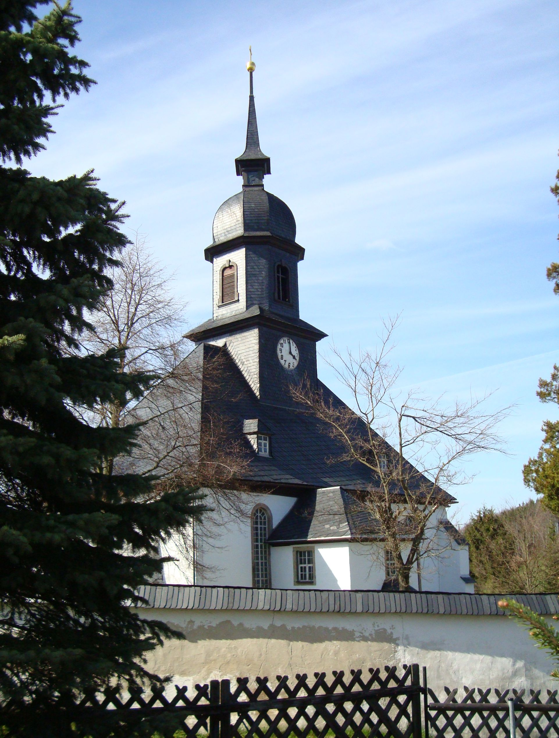 Kirche in Hormersdorf im Erzgebirge